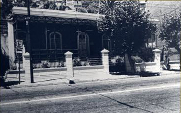 Calle Colón 2128, Valparaíso, Chile Segunda sede del Curso de Leyes de Valparaíso, a partir del año 1927, luego de dejar las dependencias del Liceo de Hombres de Valparaíso (actual Liceo Eduardo de la Barra), ubicado al lado. Actualmente se encuentra allí otro edificio, ocupado por la Escuela de Trabajo Social de la Facultad de Derecho y Ciencias Sociales de la Universidad de Valparaíso.